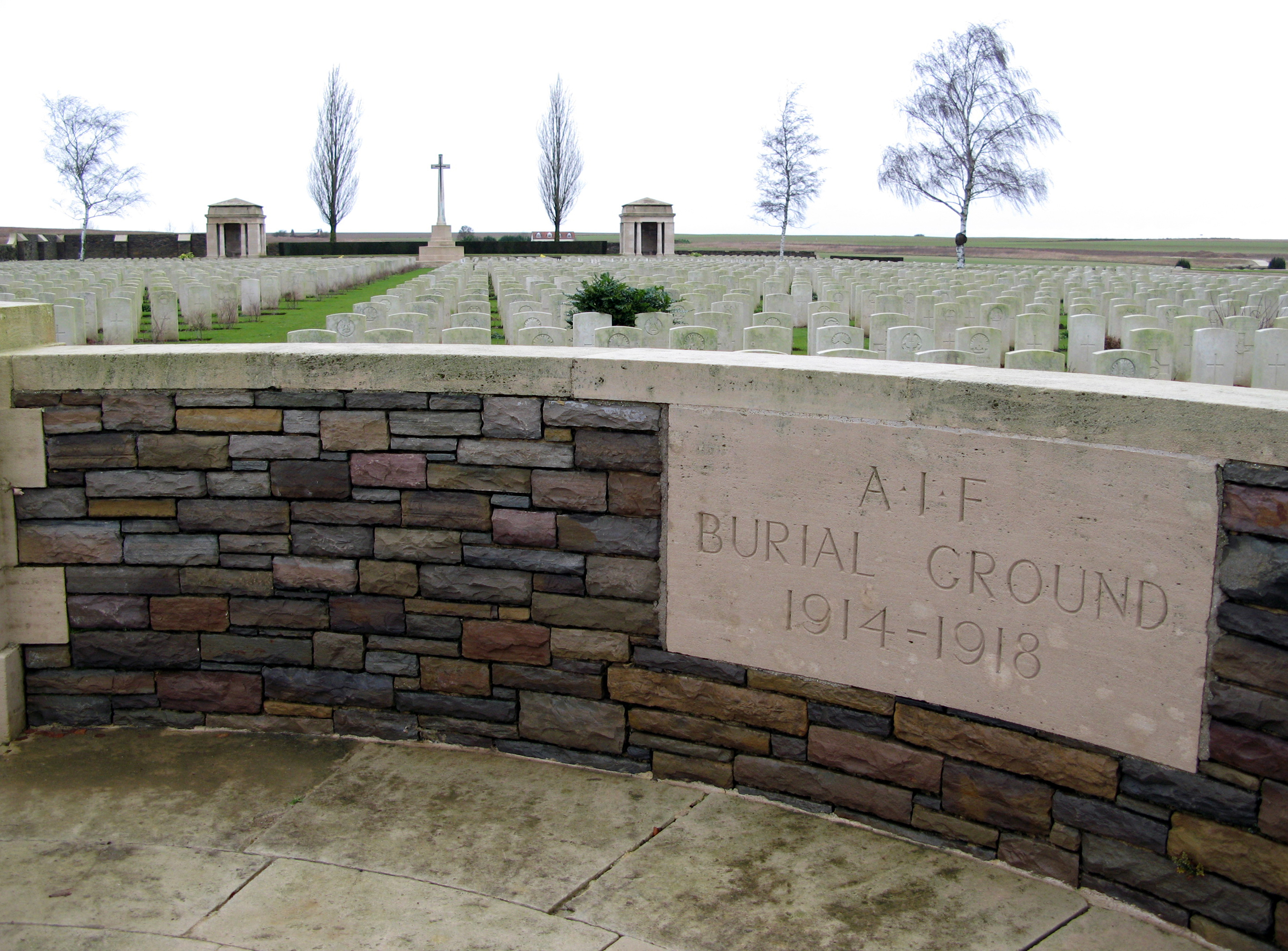 Flers (Somme, France) - Le cimetière militaire "A.I.F. Burial Ground" est accessible depuis la route entre Le Sars (à l'Ouest) et Gueudecourt (à l'Est). On remarque que, dès la mauvaise saison et ses longues périodes humides (photo prise début décembre), la pierre des tombes verdit. On imagine l'importance de l'entretien nécessaire pour retrouver l'aspect impeccable pour les beaux jours.